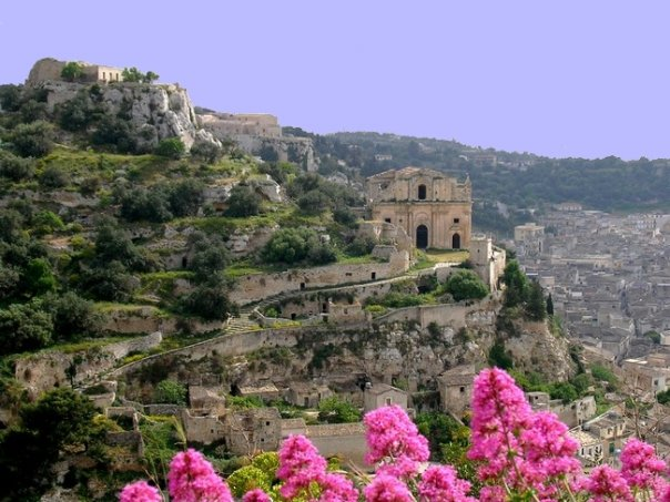 Provincia de Scicli en la isla de Sicilia - Italia 2010